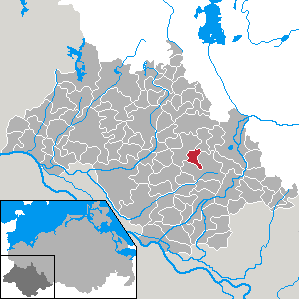 Warlow in Mecklenburg-Vorpommern - district Ludwigslust